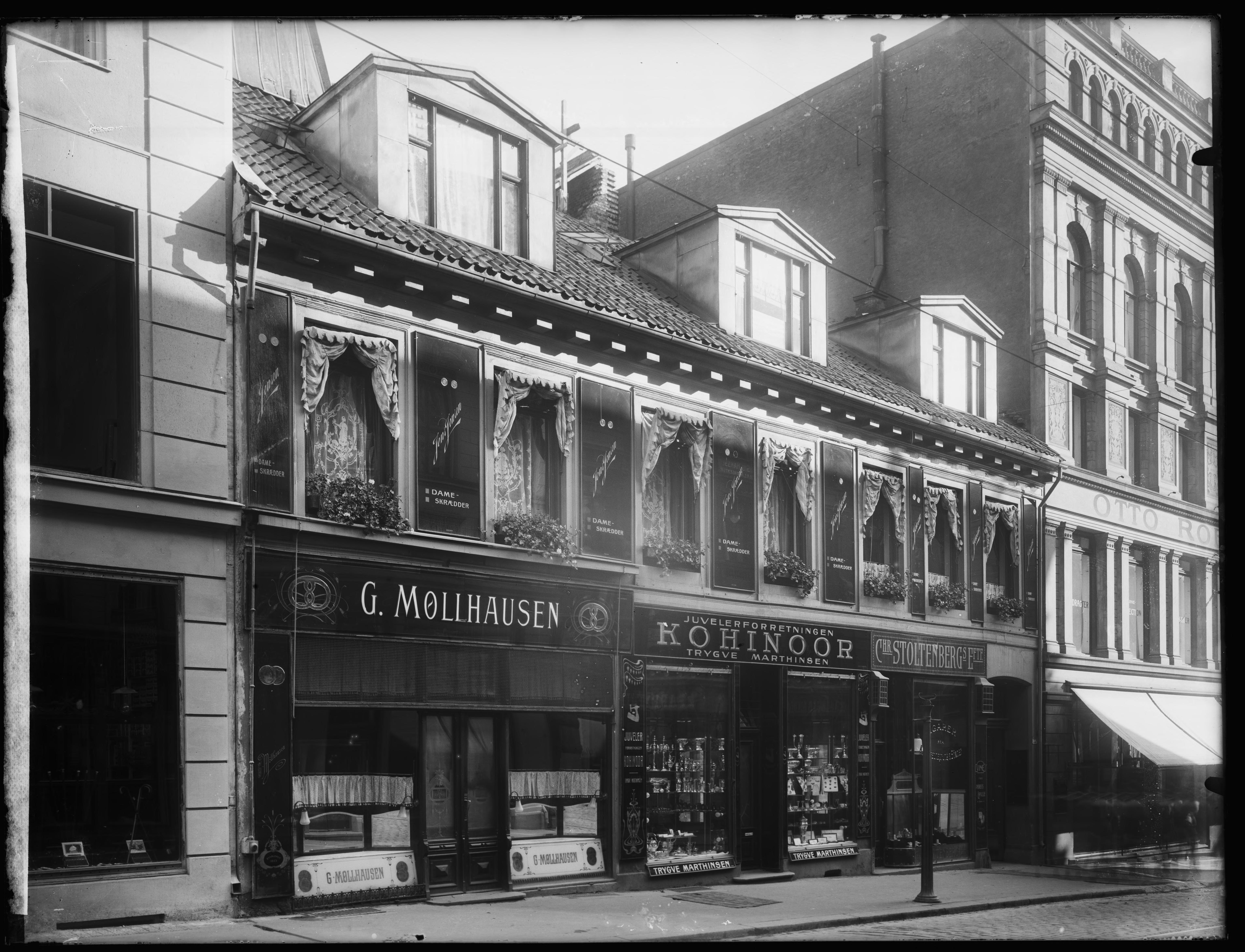 Bildet er hentet fra Nasjonalbibliotekets bildesamling. Anmerkninger til bildet var: Påskrift arkivark: Skrædder Jensen Eldste arkivnummer: 428 Oslo, Oslo, Oslo